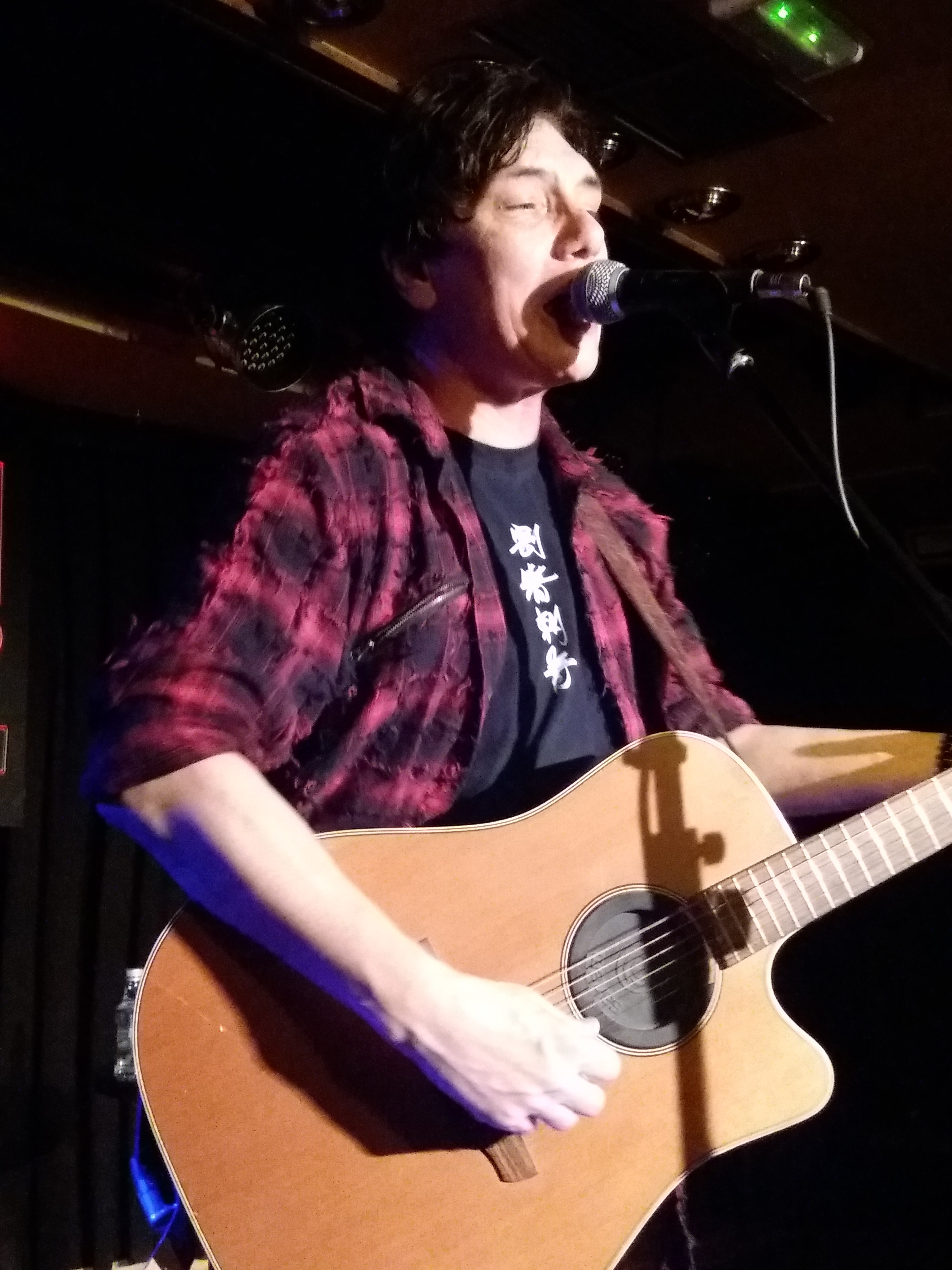 Concierto de Eric Martin (cantante de Mr. Big) en concierto; sala Porta Caeli en Valladolid (España), en 2018.